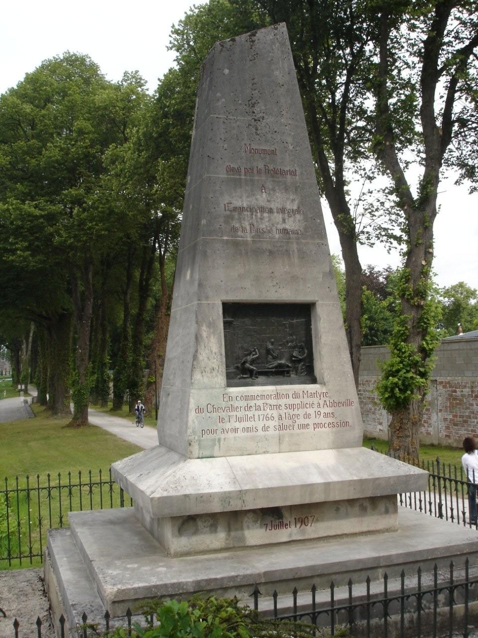 vue du Monument au Chevalier de Labarre, victime de l'intolérance religieuse, à Abbeville (Somme)